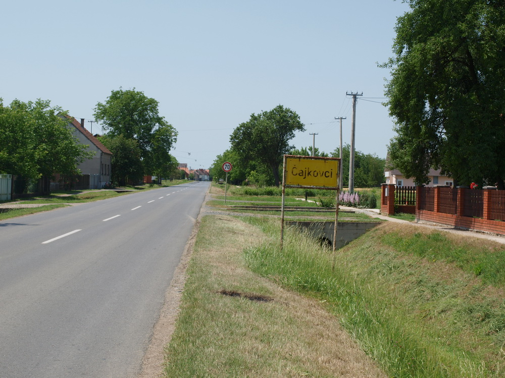 Ulaz u selo Čajkovci, Brodsko-posavska županija.